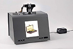 Aufnahmebox (?)